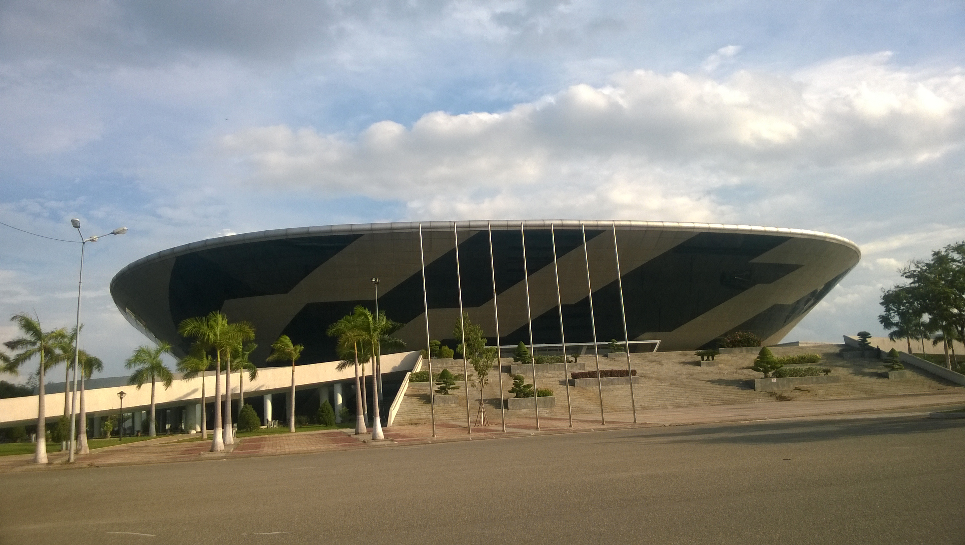 Cung Thể thao Tiên Sơn